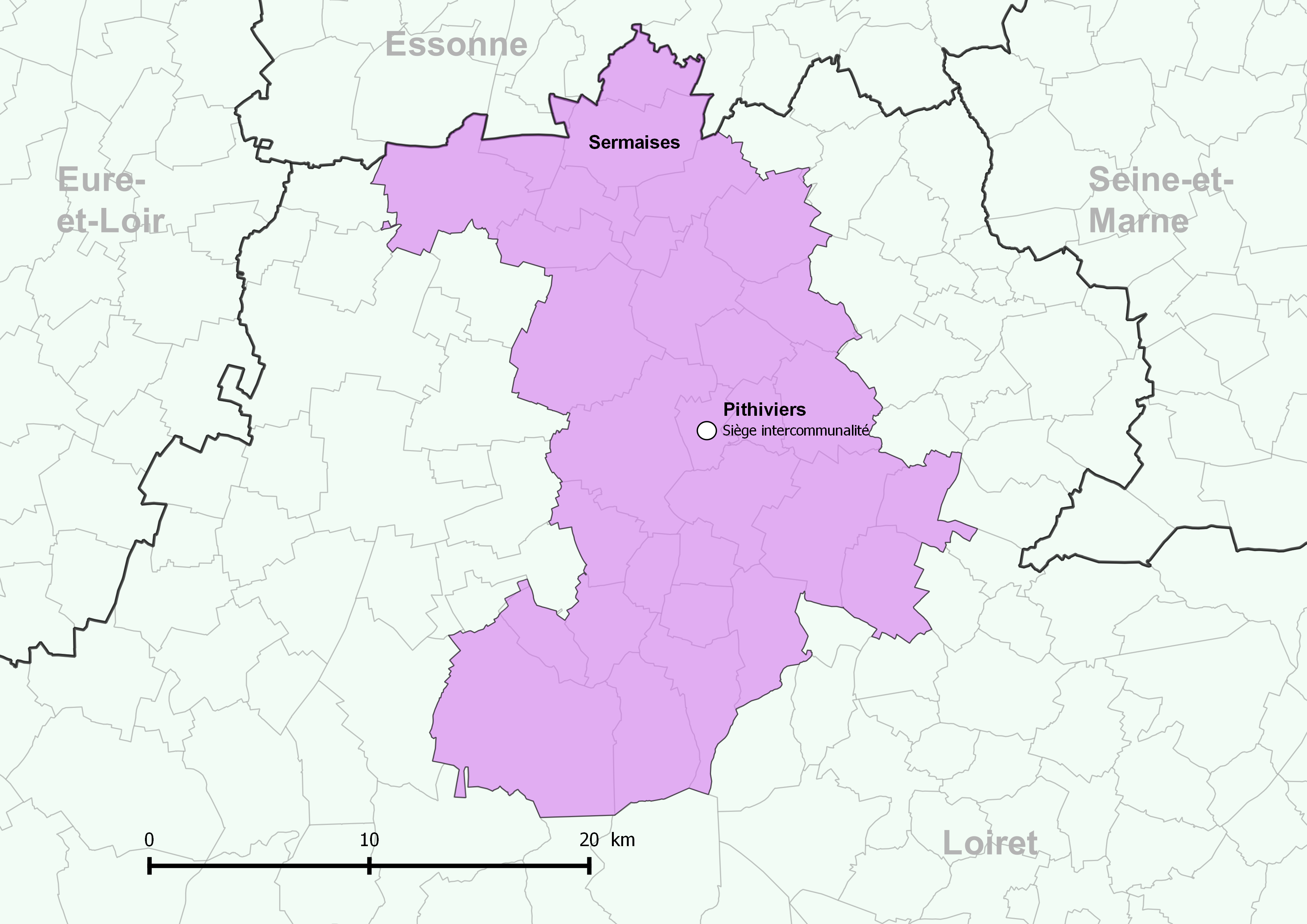 Périmètre de la communauté de communes du Pithiverais - Positionnement de la commune de Sermaises.